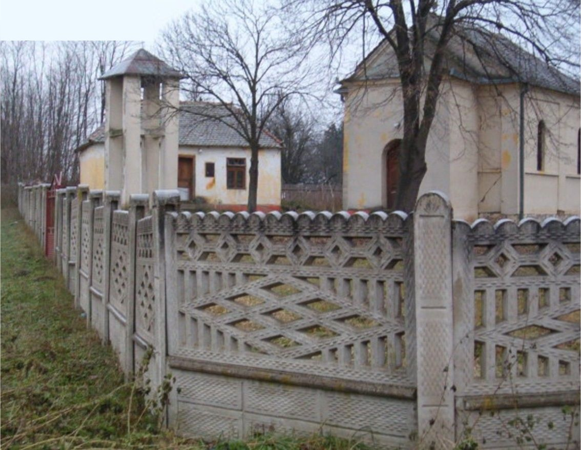 Црква у Јошеви.